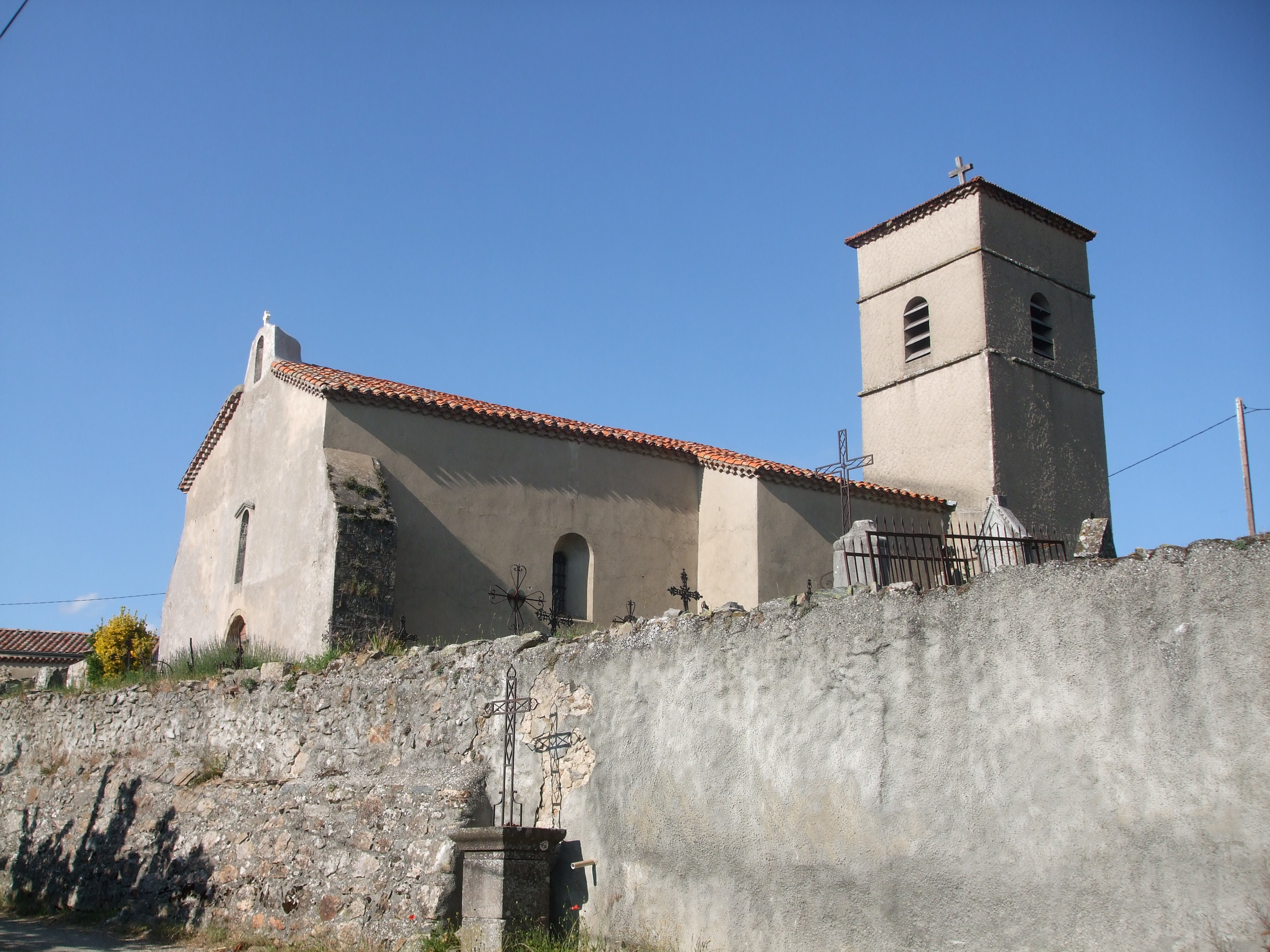 église Saint Julien